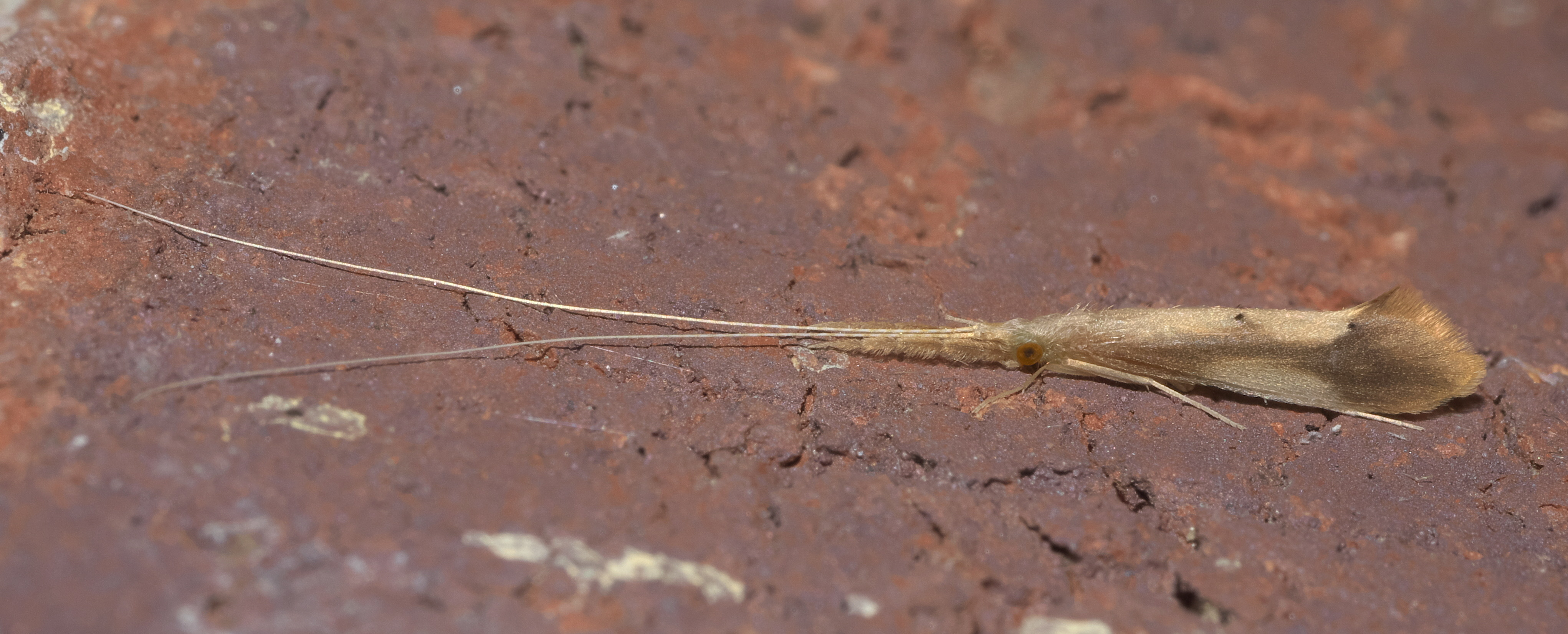 Triaenodes, Family: Long-horned Caddisflies